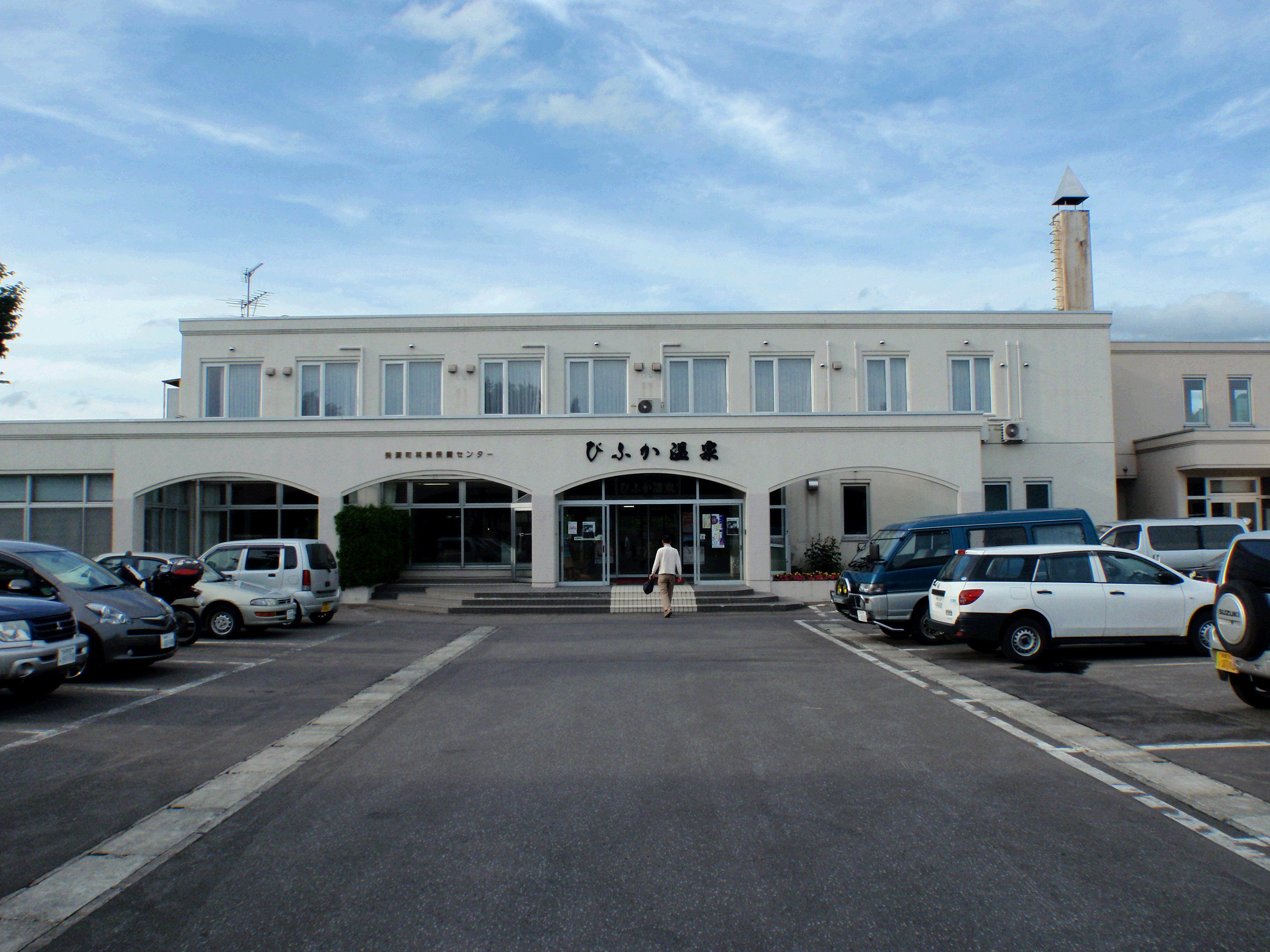 びふか温泉